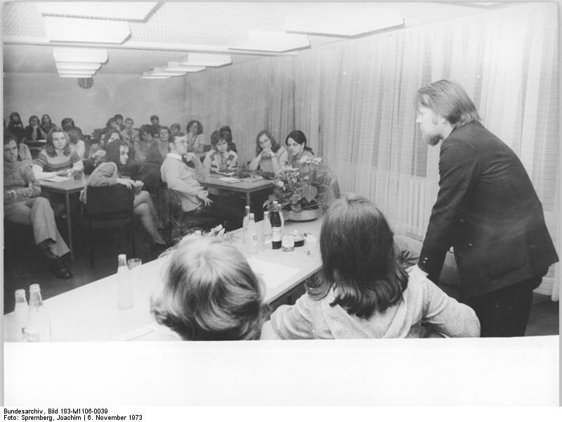 Berlin, Jugendstunde mit Michail Rostschin ADN-ZB Spremberg 6.11.1973 Berlin: Zu einem freundschaftlichen Treffen mit dem sowjetischen Schriftsteller Michail Rostschin (r.) und Jugendweiheteilnehmern sowie Mitgliedern von Jugend- und Literaturklubs kam es am 6.11.1973 in der Stadtbezirksbibliothek Friedrichshain. Hier antwortet der bekannte sowjetische Schriftsteller, dessen Stück "Valentin und Valentina" auch in der DDR mit großem Erfolg aufgeführt wurde, auf Fragen der Jugendlichen.